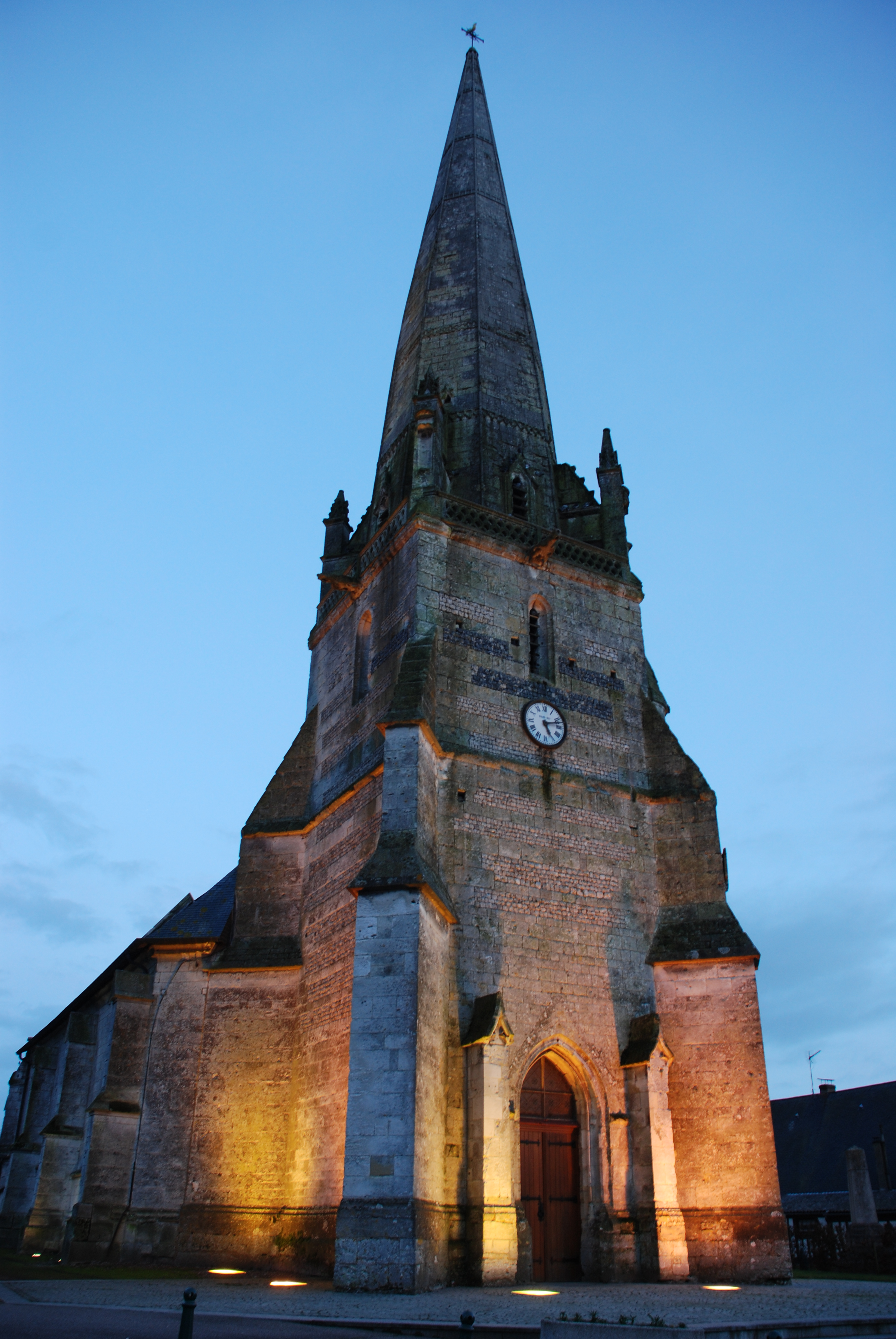 Église Saint-Léonard de La Cerlangue, (Classé, 1914)